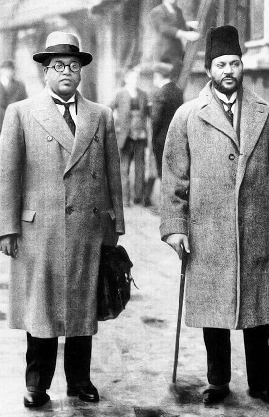 लंडन मधील दुसऱ्या गोलमेज परिषदेमध्ये गेले असता डॉ. बाबासाहेब आंबेडकर आणि महम्मंद झाफ्रुल्ला खान यांचे हाऊस ऑफ कॉमन्सच्या बाजूला टिपलेले छायाचित्र.